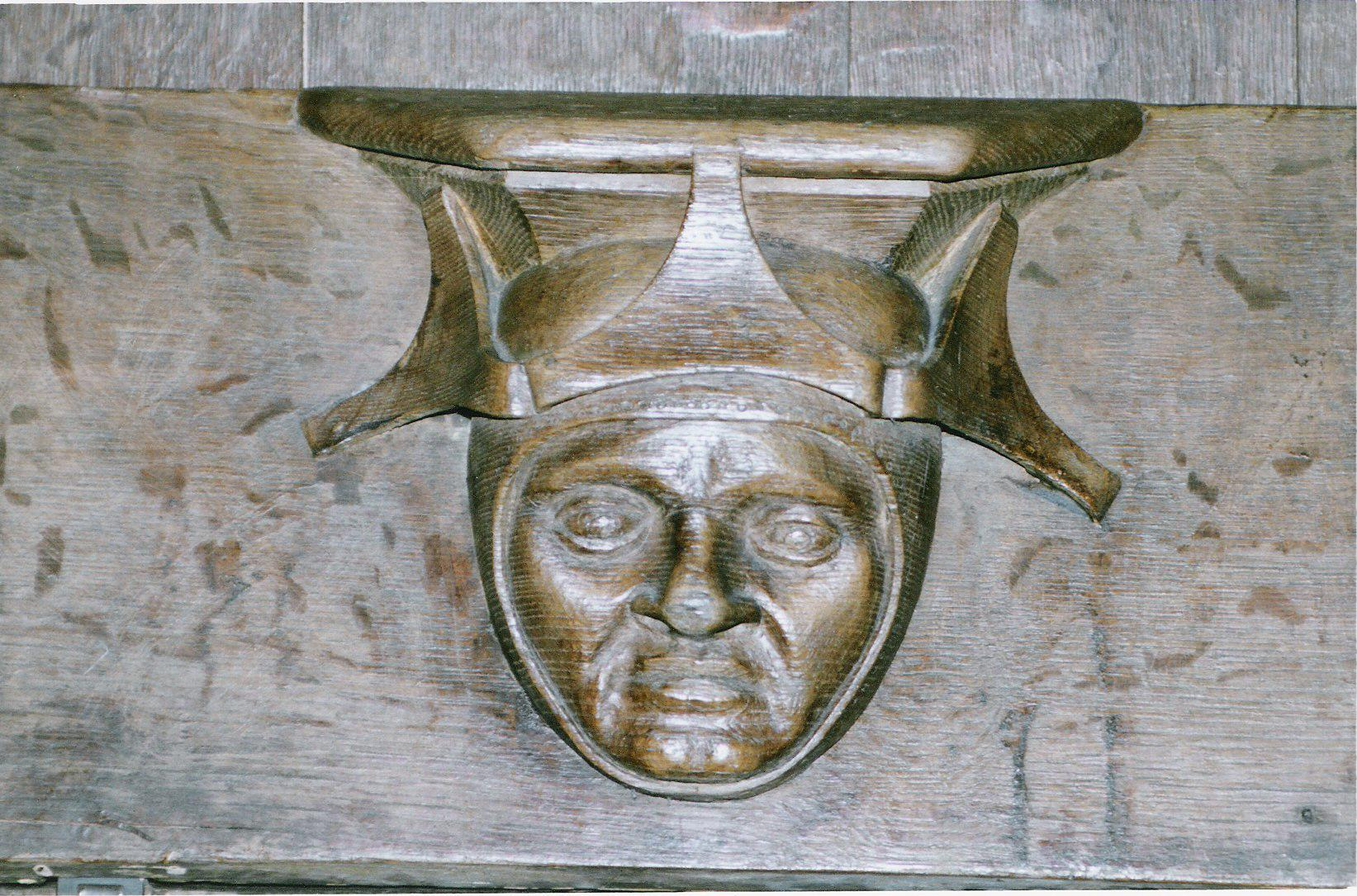 Miséricorde en bois sculpté sur l'une des stalles du début du XVIe siècle de l'église Notre-Dame de Bourg-en-Bresse (Ain, région Rhône-Alpes, France)